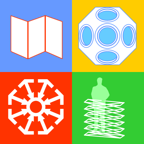 Dirk Bindmann